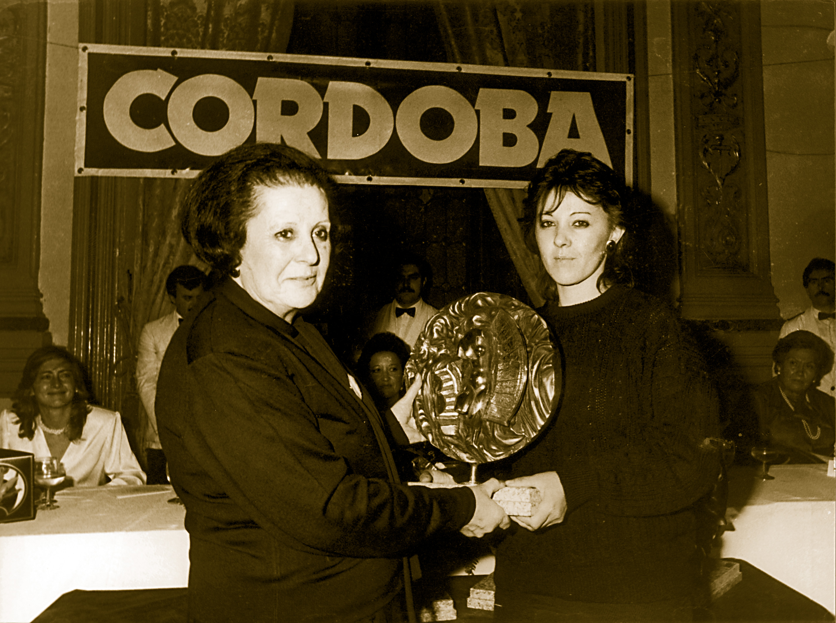 Ana García de Cuenca. Cordobesa del Año